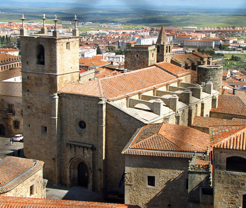 Iglesia concatedral de Santa María de Cáceres, tomada desde una de las torres de la Iglesia de San Francisco Javier.